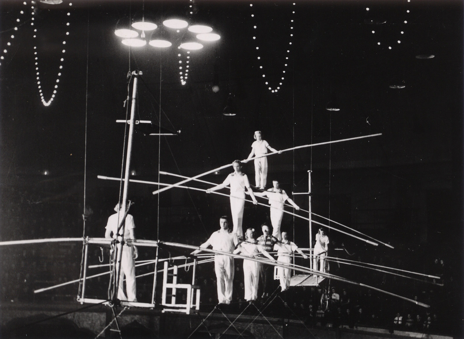 Die Bob Gerry Troupe im Circus Sarrasani in Dresden kurz vor dem Bombenhagel.